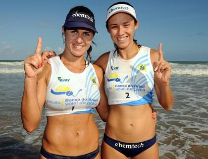 Talita e Maria Elisa, dupla de vôlei campeão do Circuito Banco do Brasil de Vôlei de praia